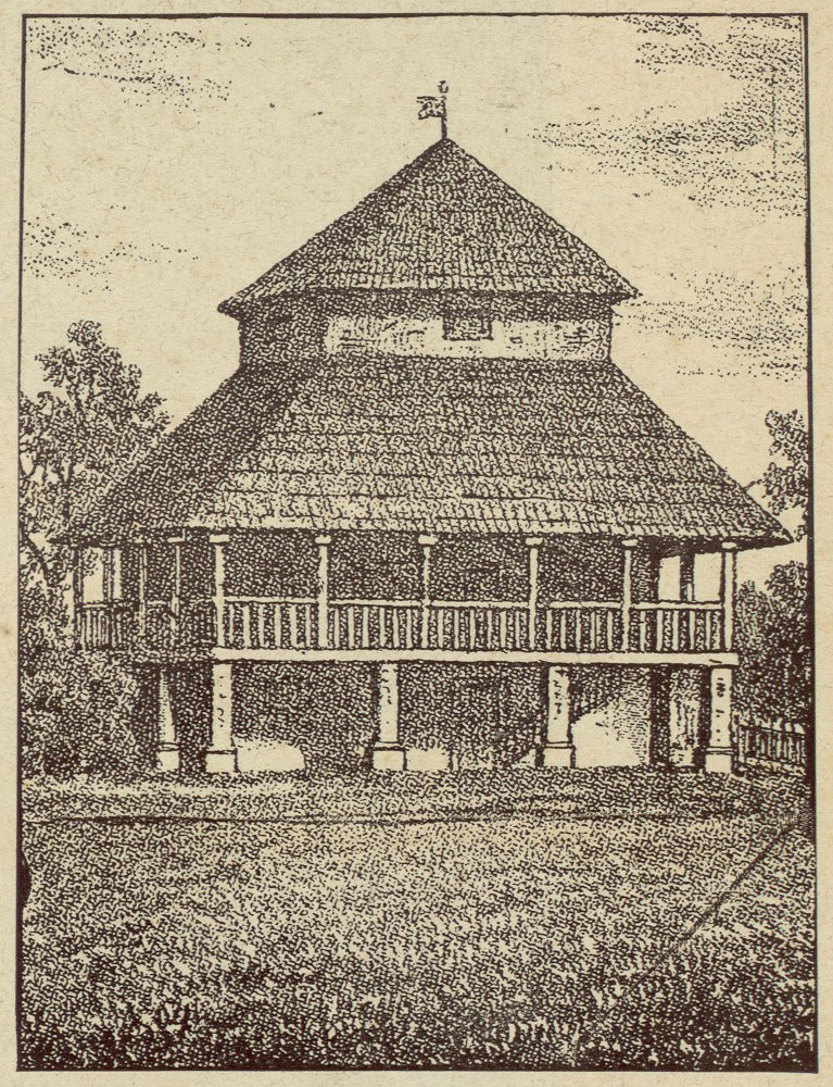 Беларуская (тарашкевіца): Сапоцкін (Sapockin). Лямус